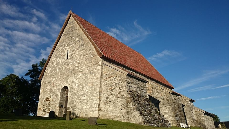 Støttemurene på Sakshaug gamle kirke, Inderøy, Norge, sett fra sørvest